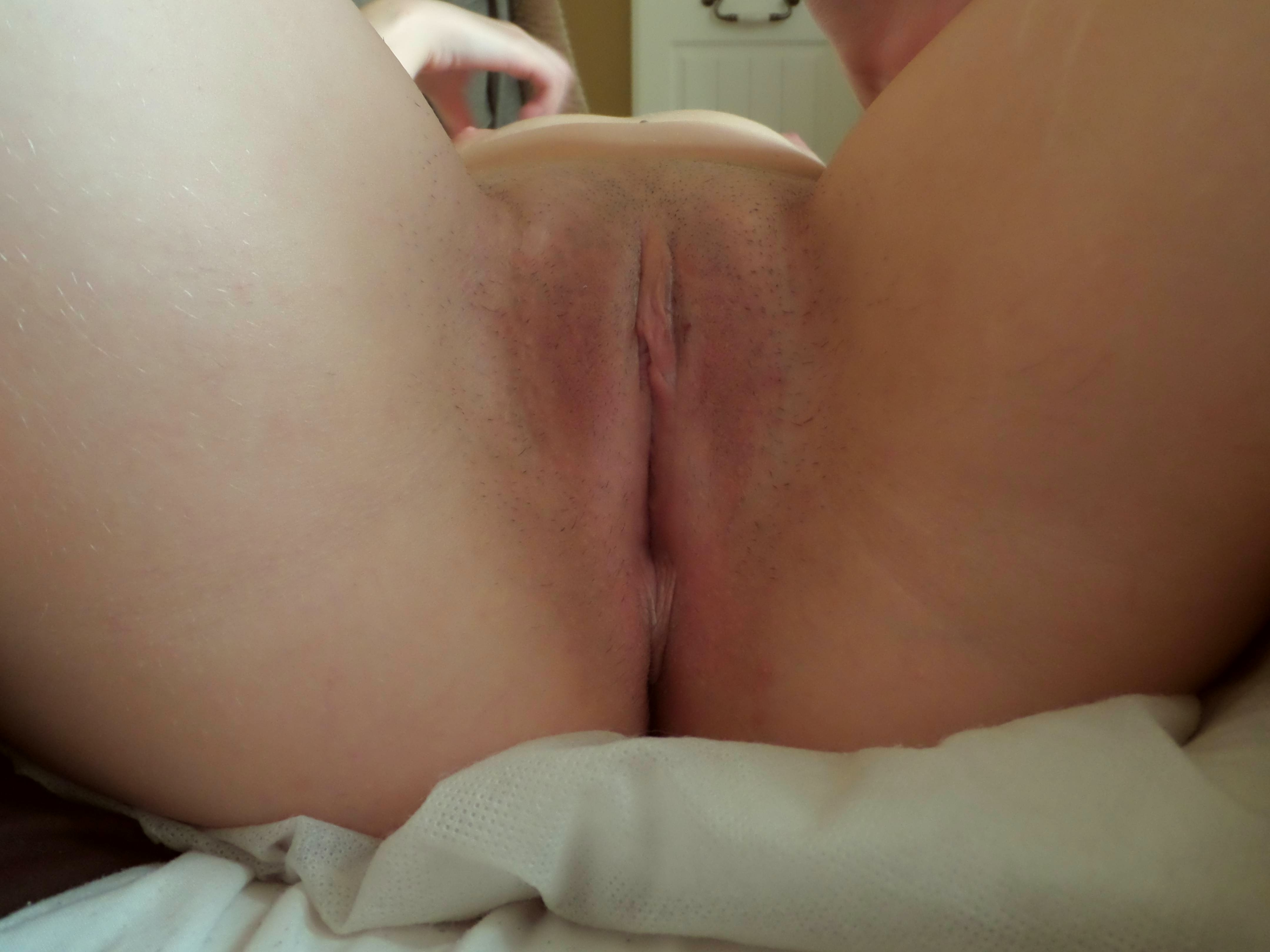 Nach der Entfernung der inneren Schamlippen